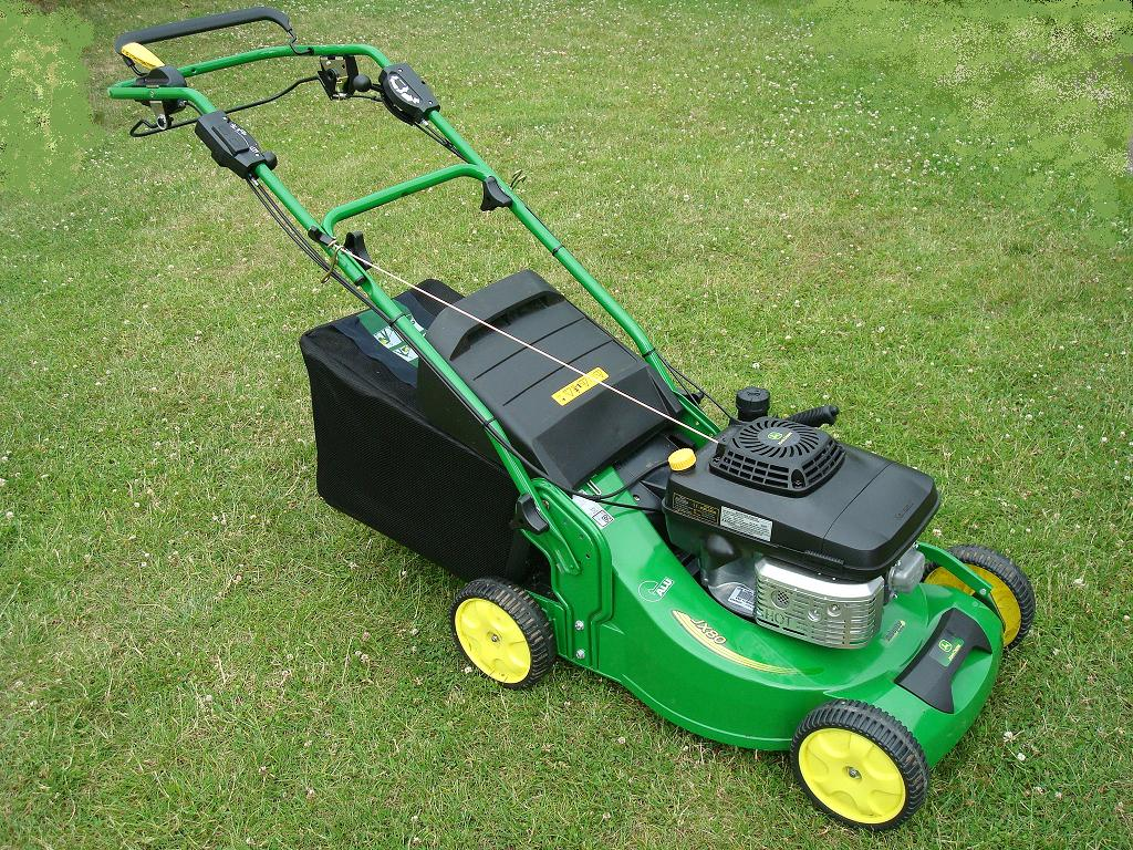 John Deere Rasenmäher JX80